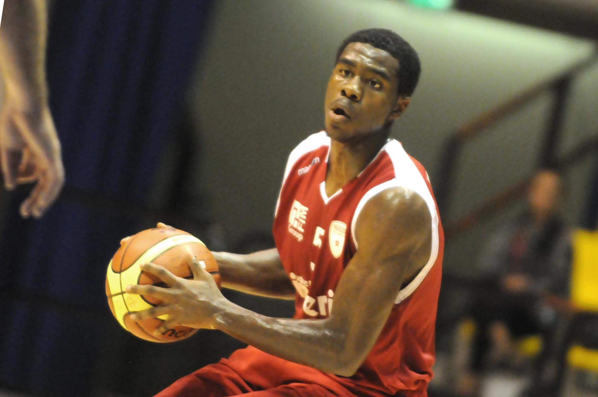 Immagine rilasciata dal proprietario della stessa, pallacanestro Varese